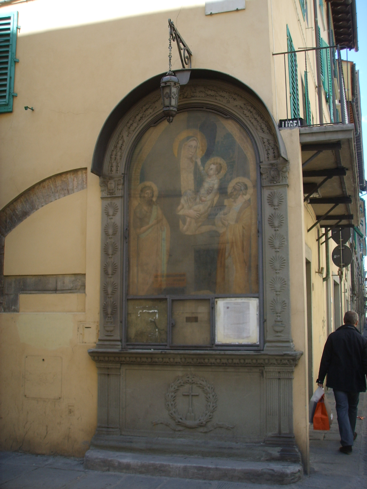 Via alfani, tabernacolo